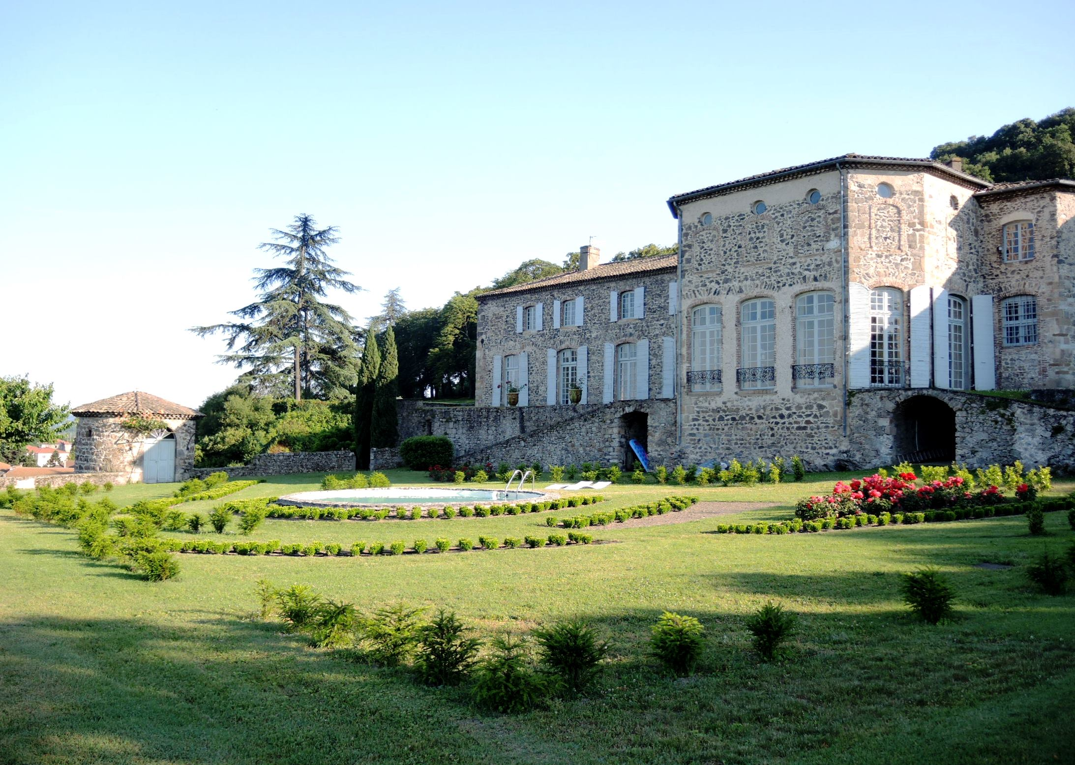 Peyraud détail